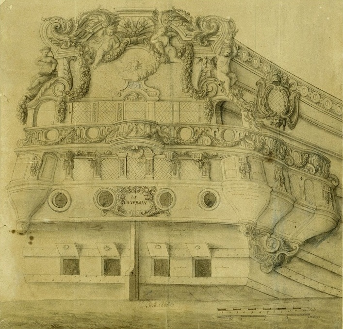 Vue arrière du vaisseau de ligne le Souverain de 80-84 canons (ex Admirable). Décors de poupe et des bouteilles. Brest. Papier. encre noire, lavis, pierre noire, encre brune. H. 46.5 cm, l. 48 cm. Montage 80 x 60 cm